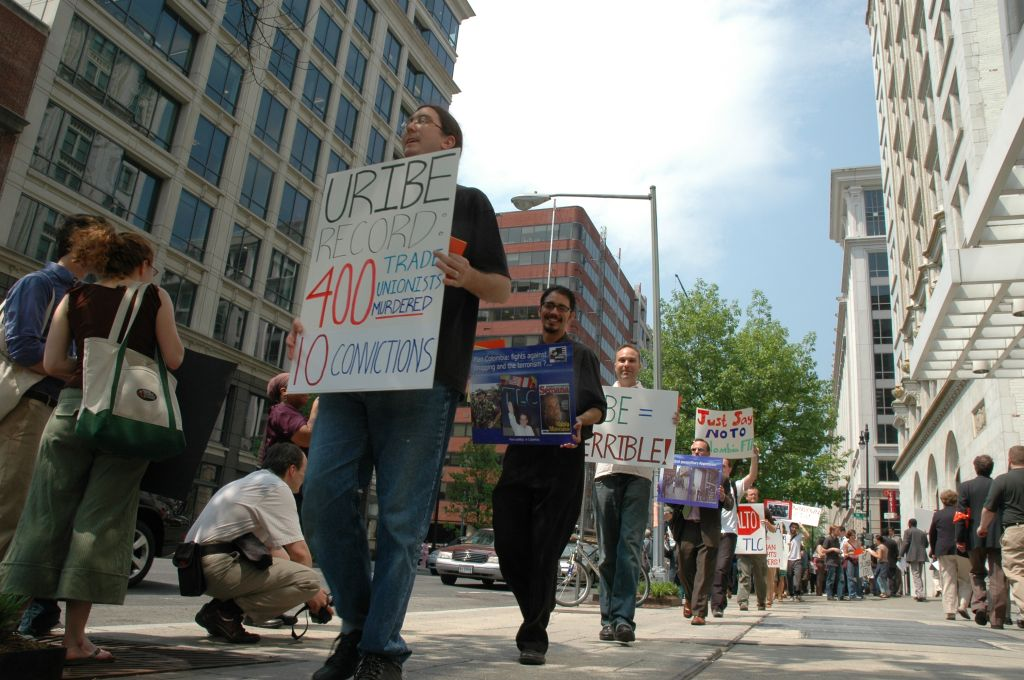 Protestas contra Alvaro Uribe y el TLC en Estados Unidos